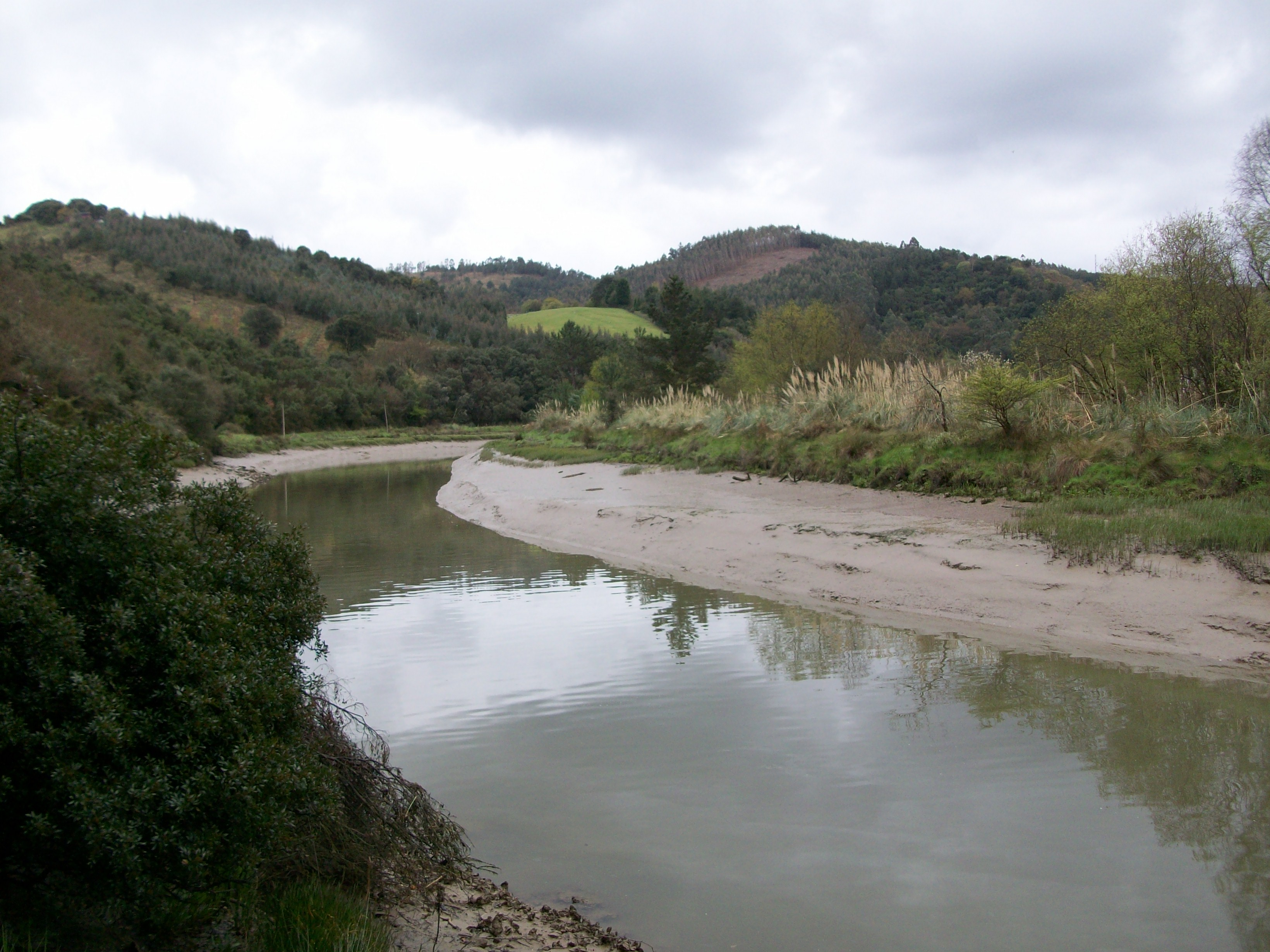 Butroe ibaia, Plentziatik gertu.